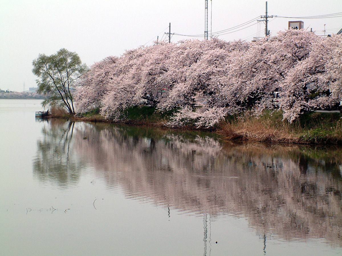 新潟市中央区、鳥屋野潟の桜。